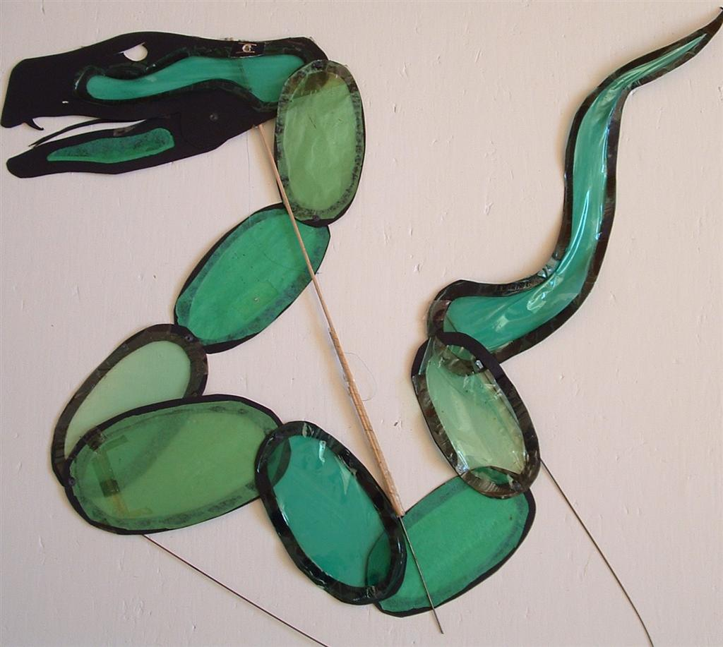 Schimpop Hans Teunissen